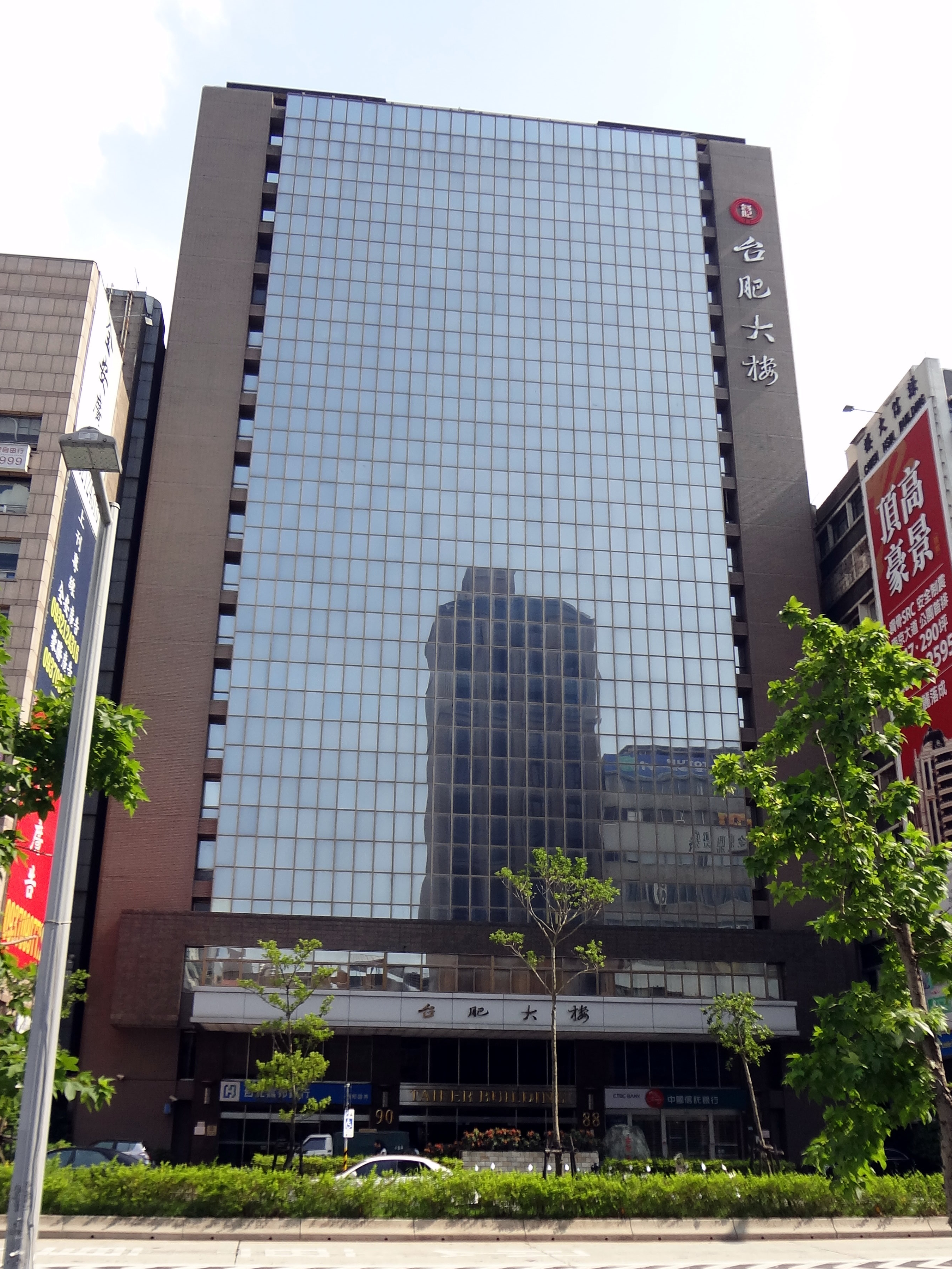 台肥大樓是台灣肥料公司總部所在地，位於臺灣臺北市中山區南京東路二段88、90號。